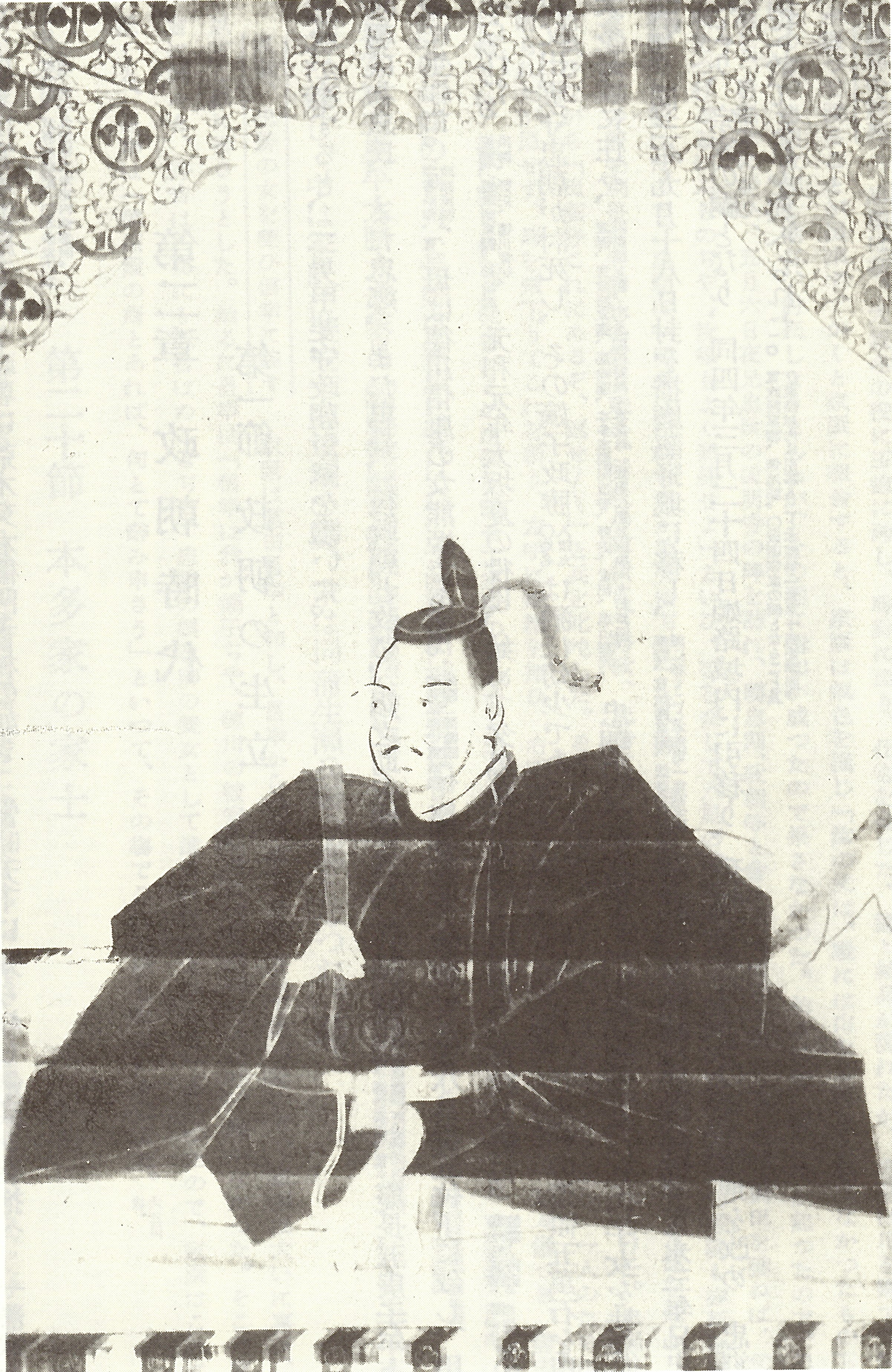 本多政朝の肖像。